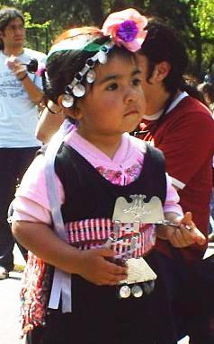 Niña mapuche vestida a la usanza tradicional, adornada con trapelacucha y trarilonco Mapudungun: Mapuche pichidomo.mapuche niña